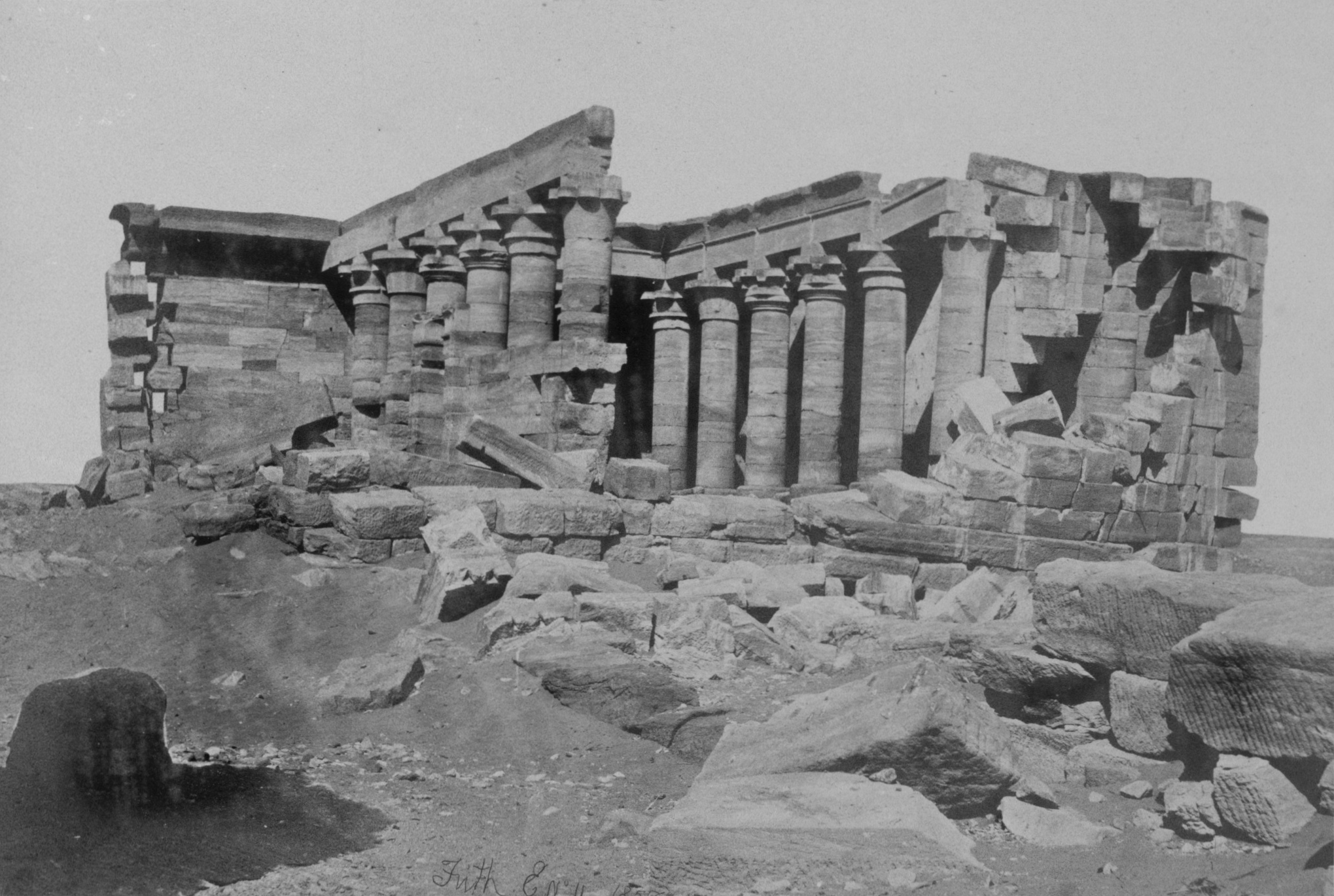 Tempel von Maharraka im Jahr 1857, Ägypten